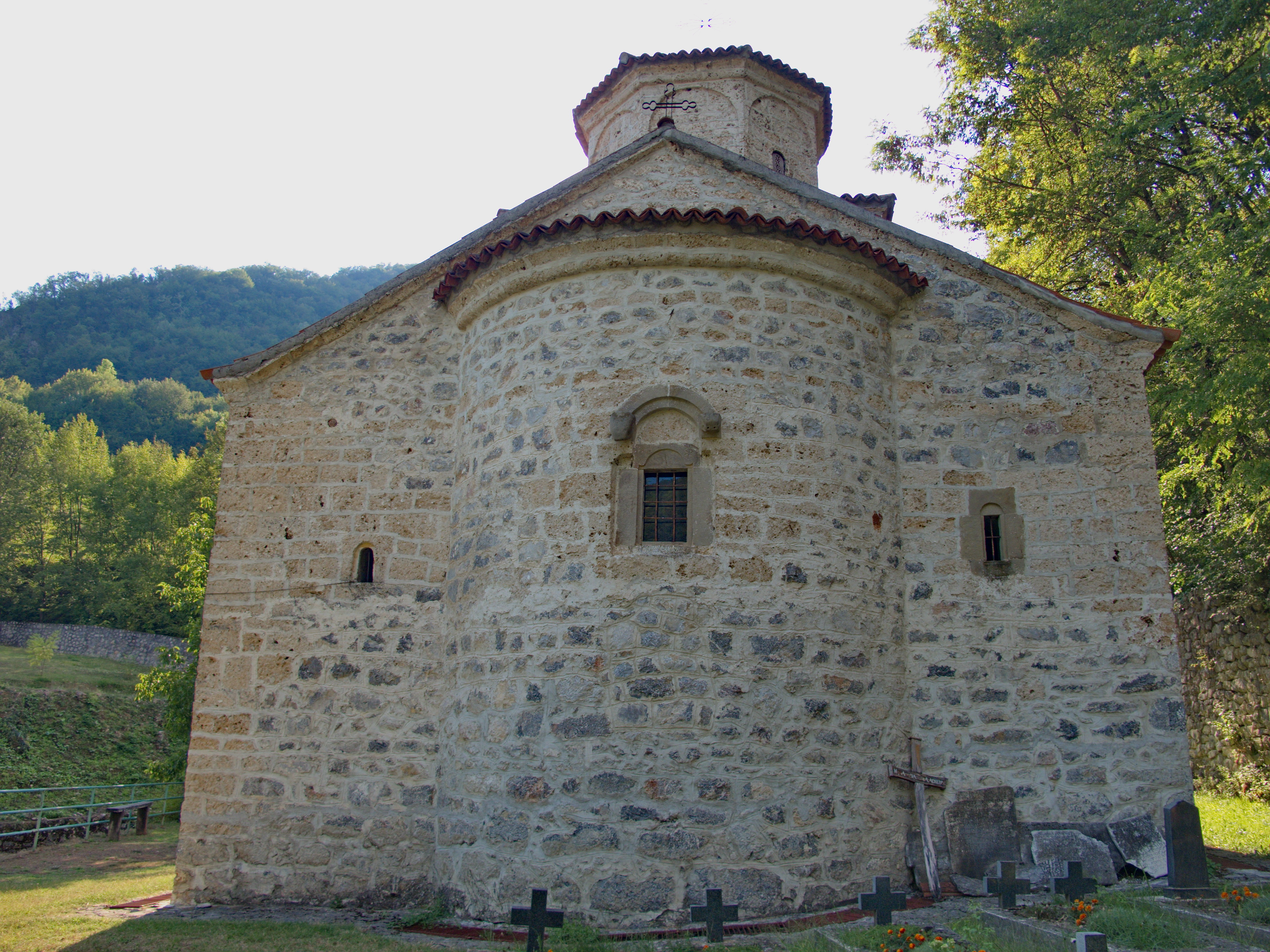 Манастир Клисура, источни зид.